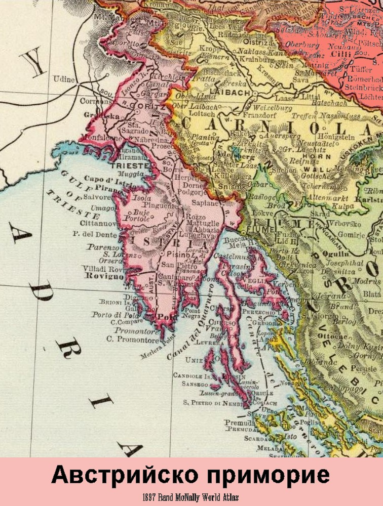 Австрийско приморие 1897